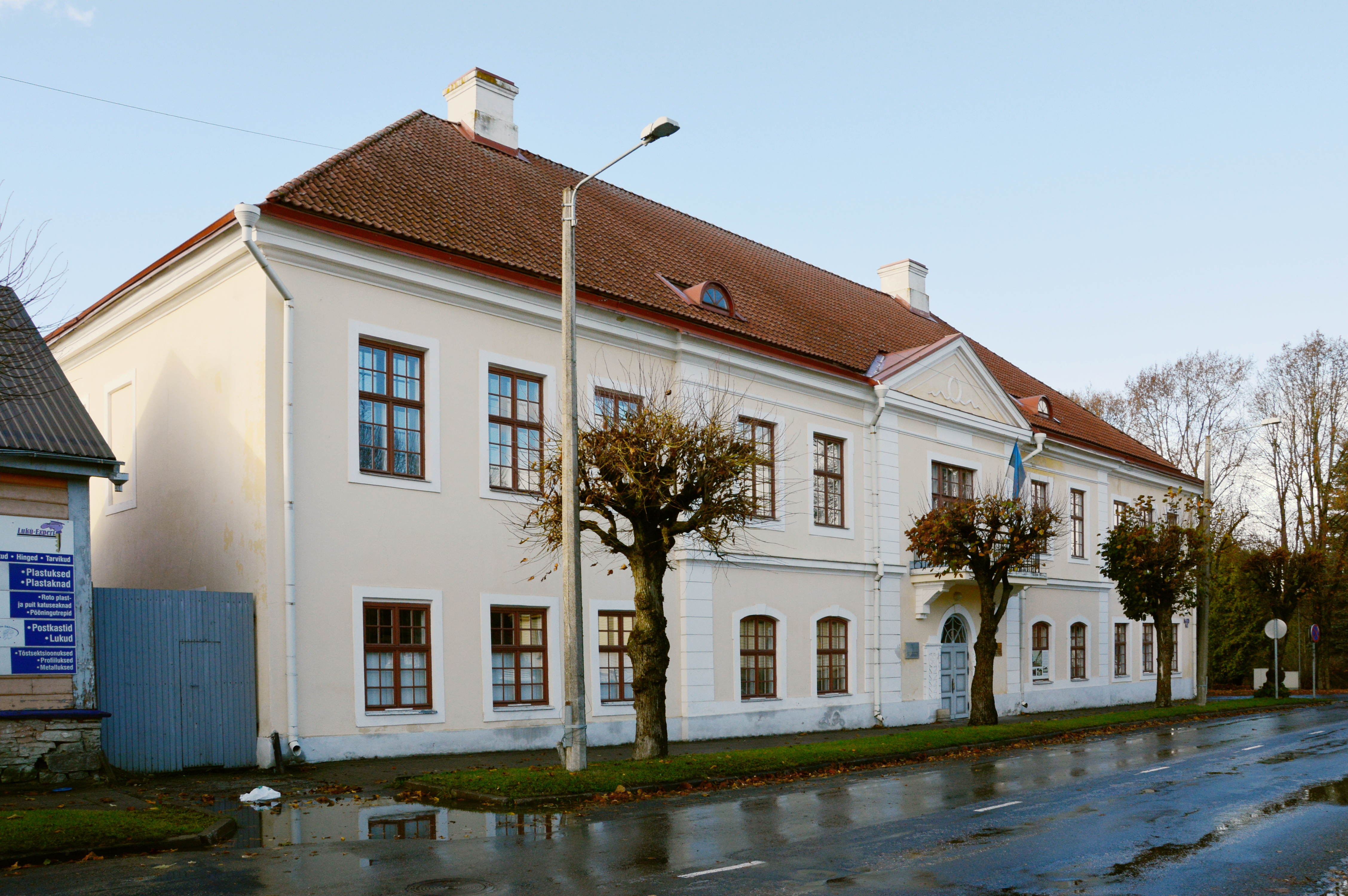 Paide kohtuhoone